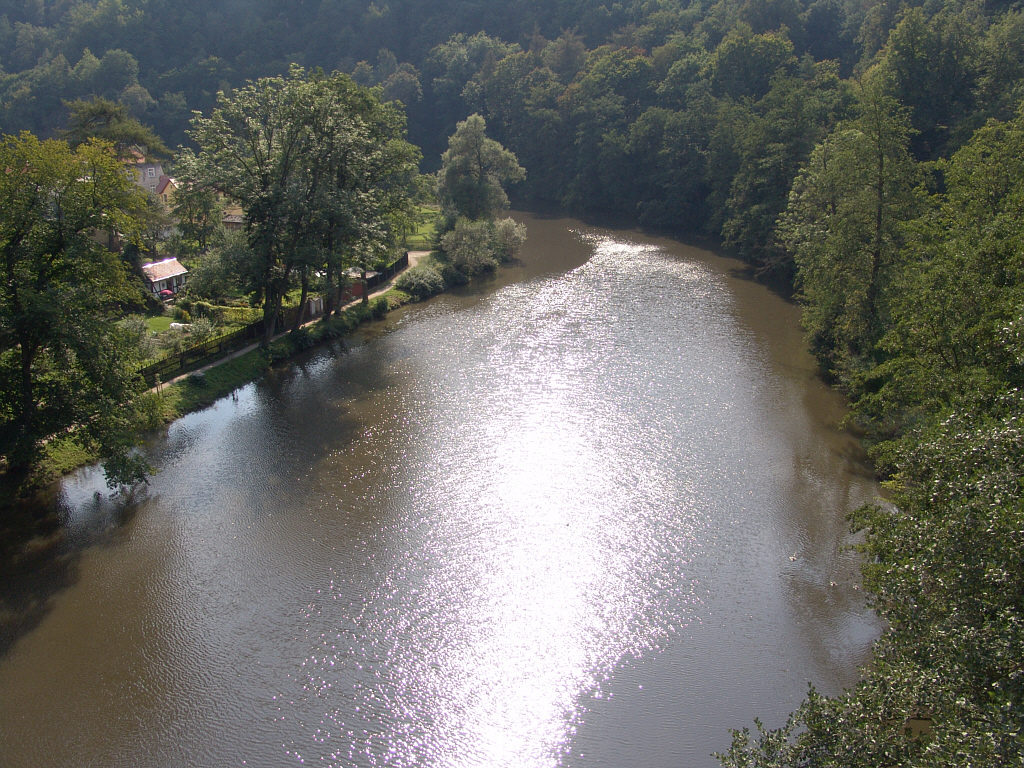 Die Egerschleife in Loket (2005) Fotograf: Walter J. Pilsak, Waldsassen Copyright Status: GNU Freie Dokumentationslizenz